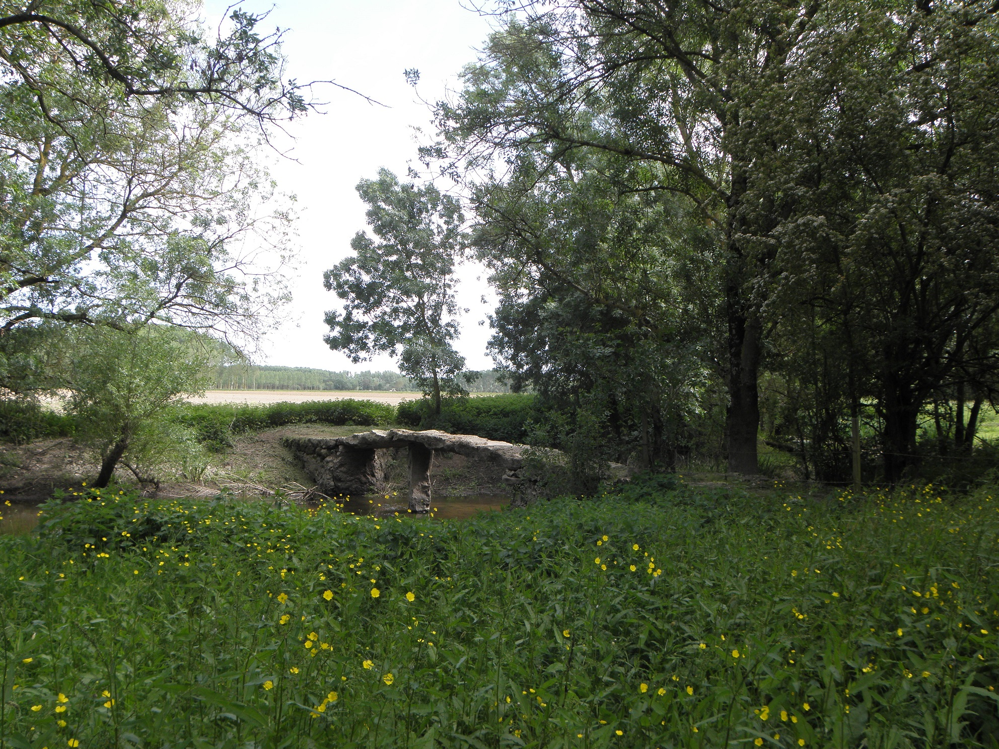 Pont mégalithique d'Artannes-sur-Thouet (49).